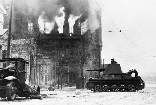 Ростов-на-Дону. Доходный дом Рецкер пожар в доме, 1941г. .